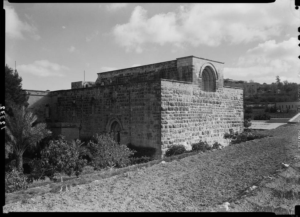 Resurrection Church of Abou Gosh